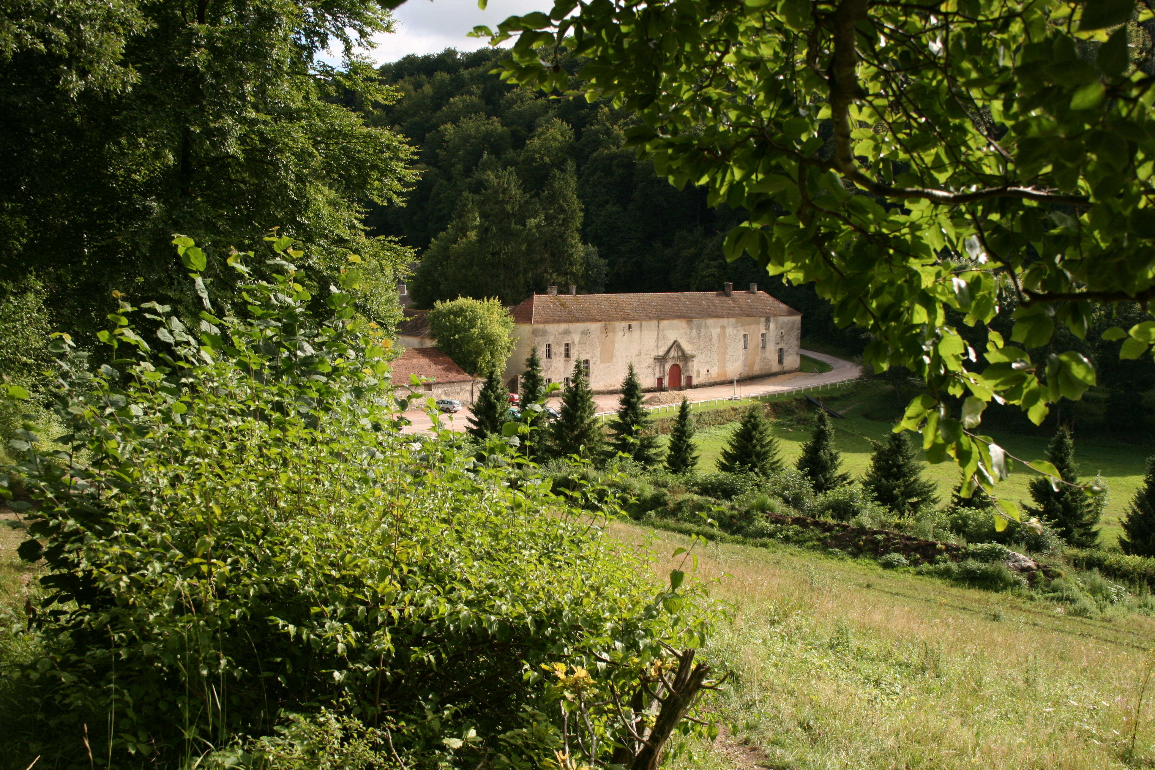 Abbaye du Val des Choues vue de l'entrée